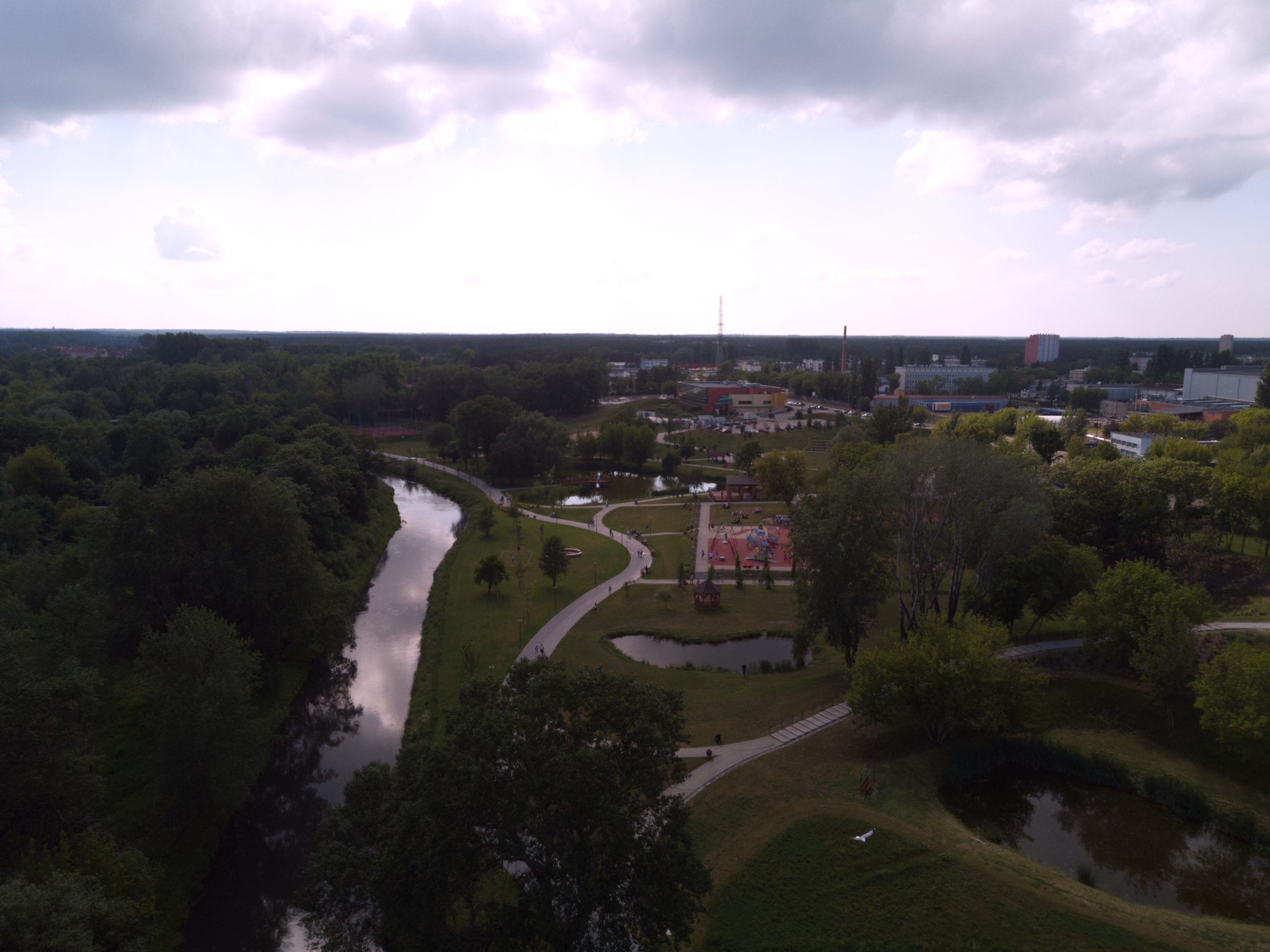 Park Sienkiewicza (2020 r.)